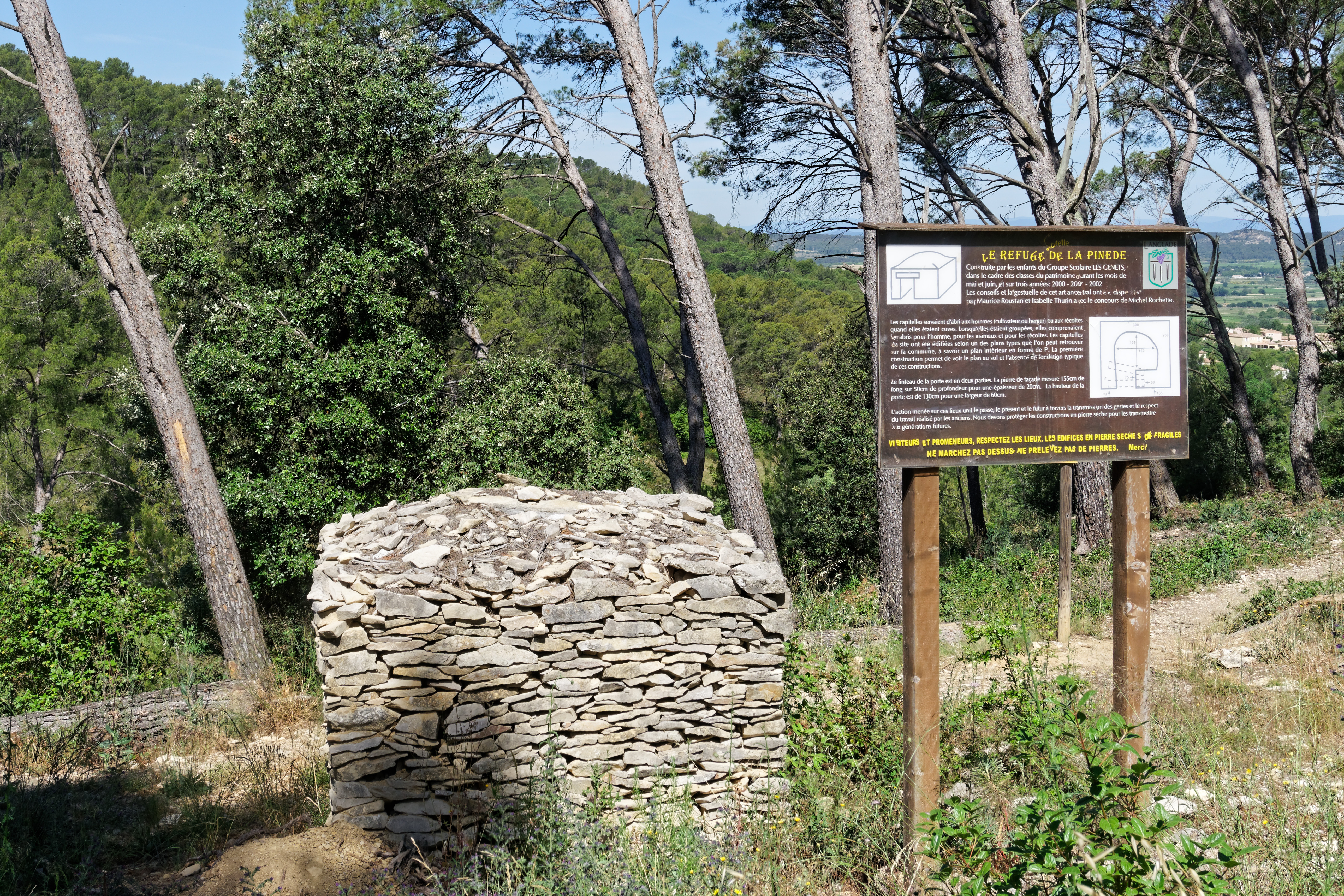 Capitelle "Le refuge de la Pinède" à Langlade, Gard